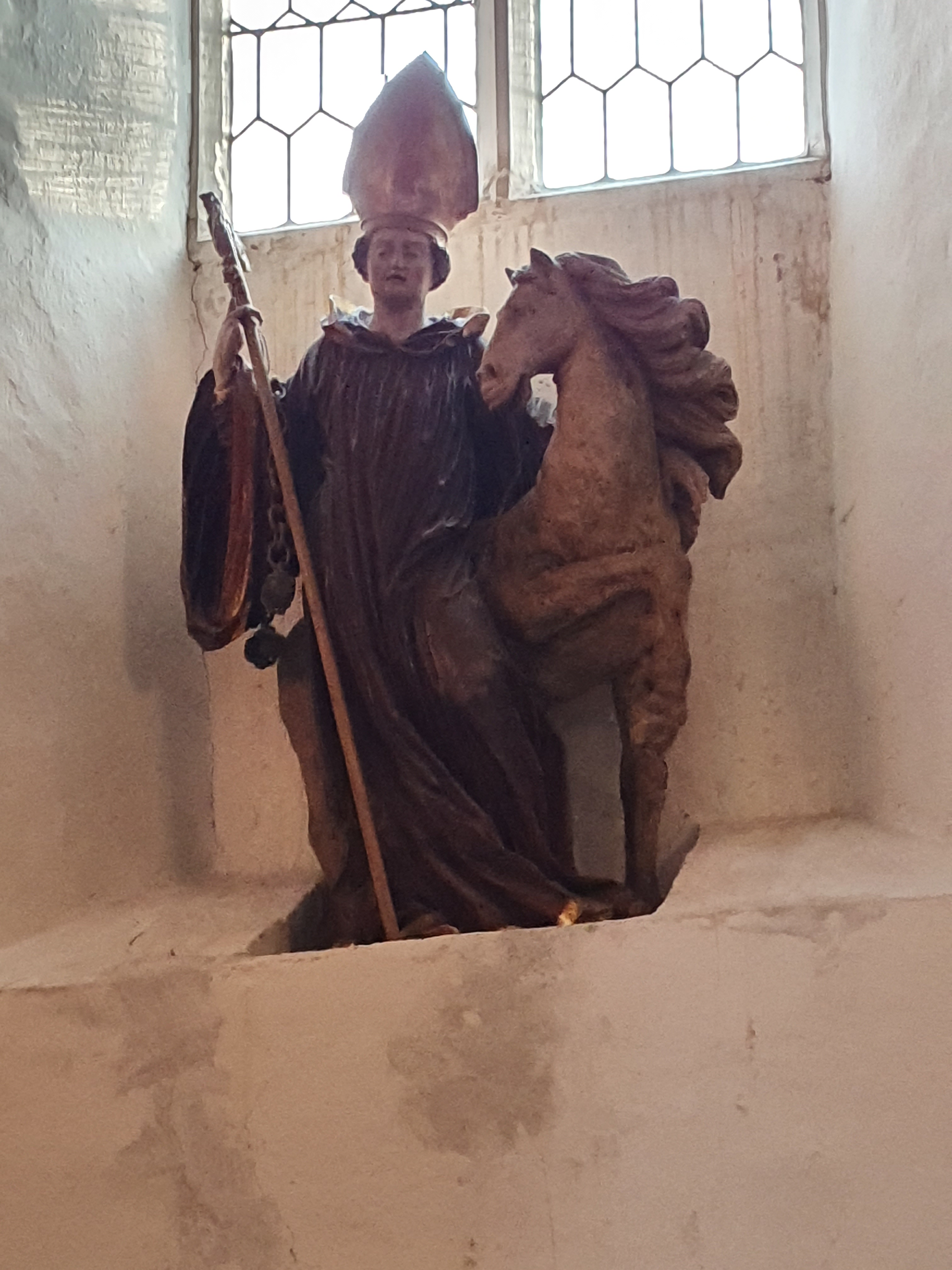 hl. Leonhard als Bischof, mit Schimmel in der Linken